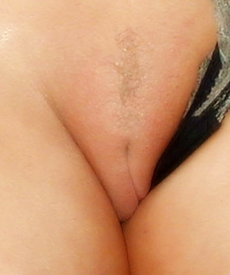 Shaved